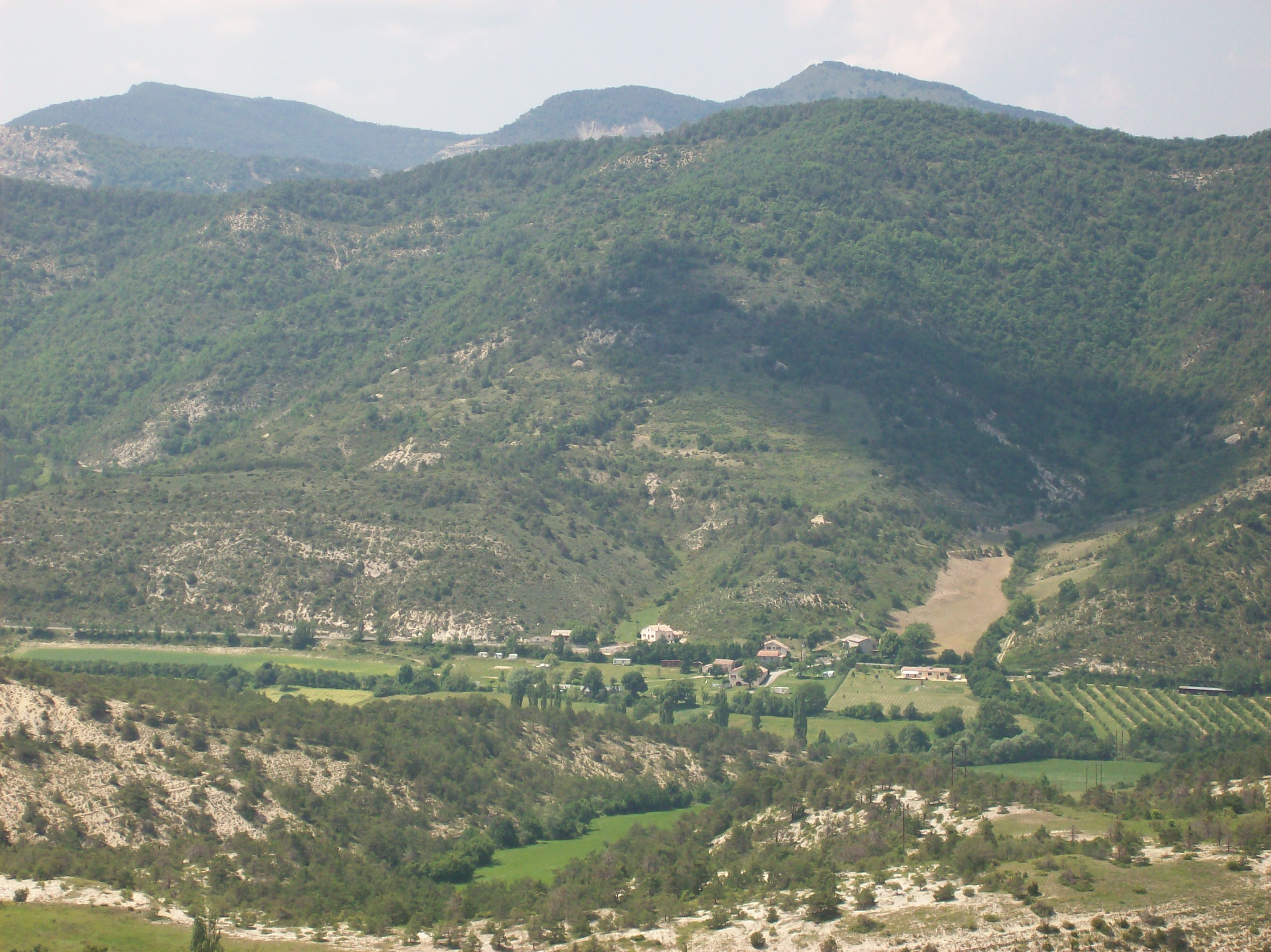 vue générale du hameau des Catoyes (commune de Sainte-Colombe) dans les Hautes-Alpes